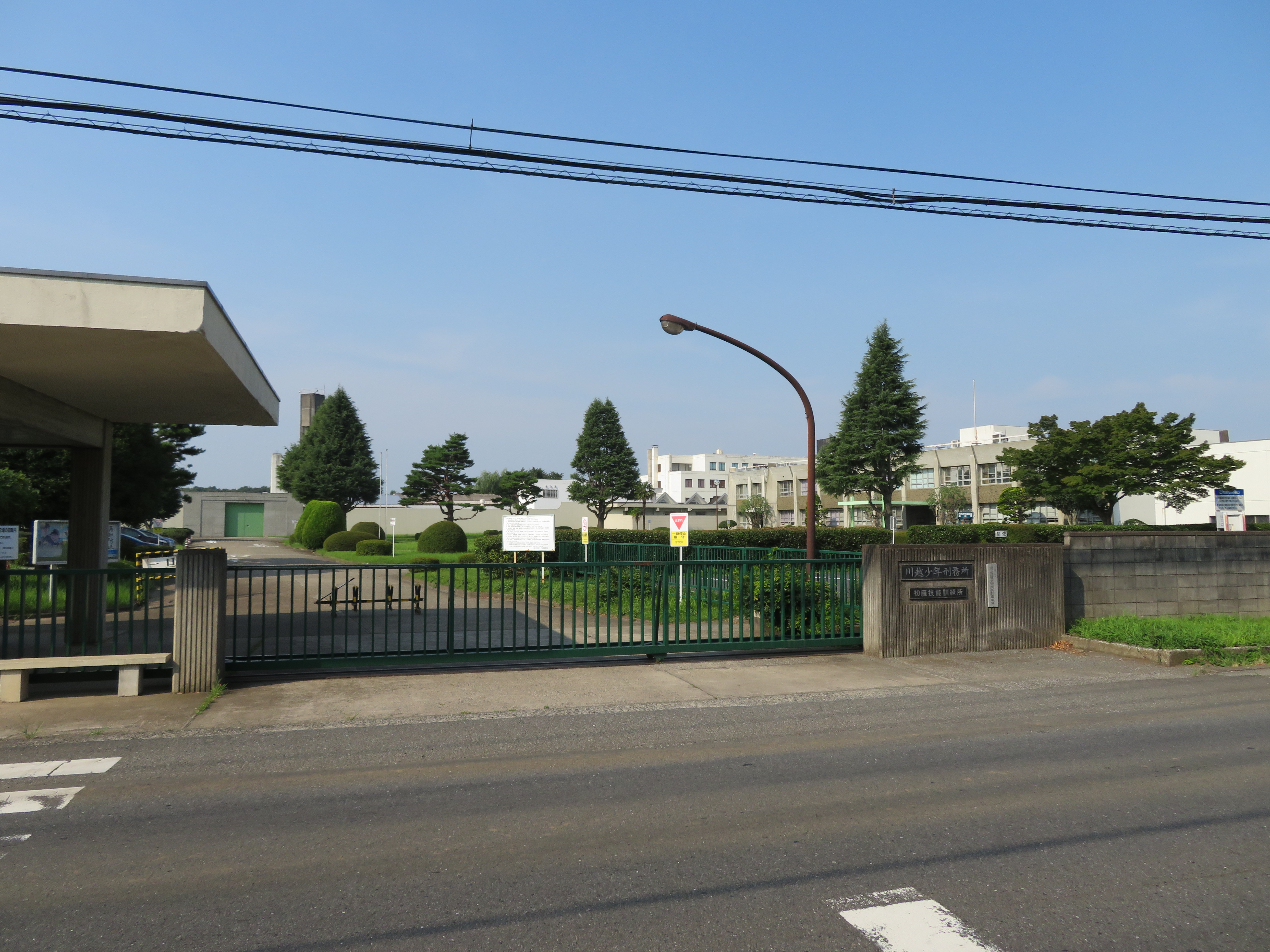 川越少年刑務所（正門付近を撮影) Canon PowerShot SX720 HS